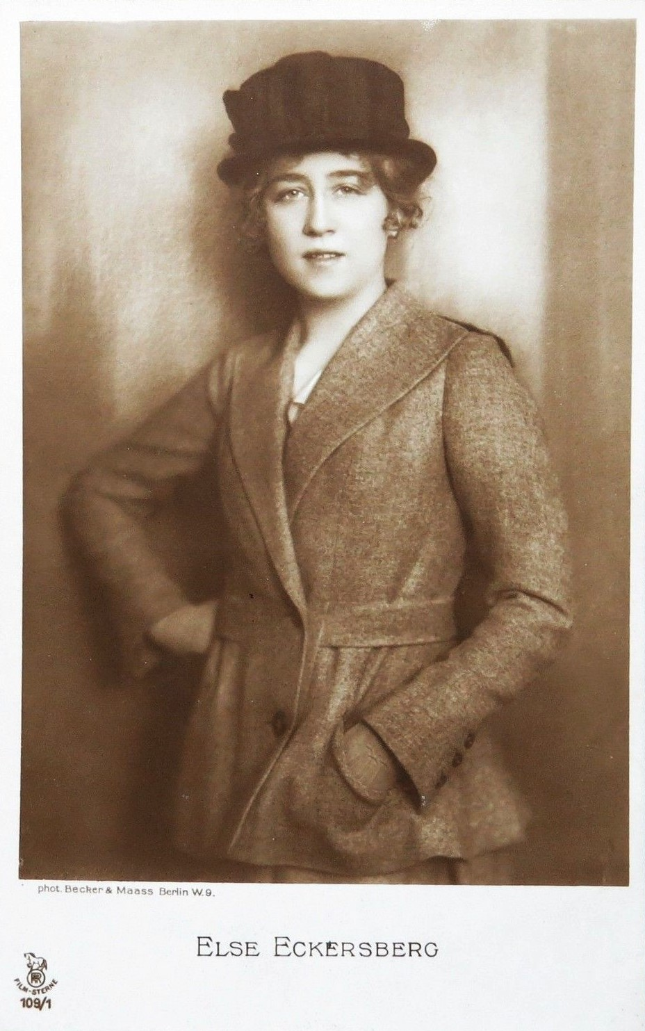 Else Eckersberg. Photopostkarte des Ateliers (Otto) Becker & (Heinrich) Maass. Film-Sterne 109/1